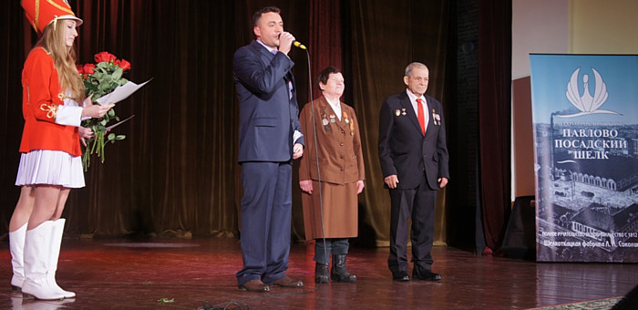 Юбилей фабрики